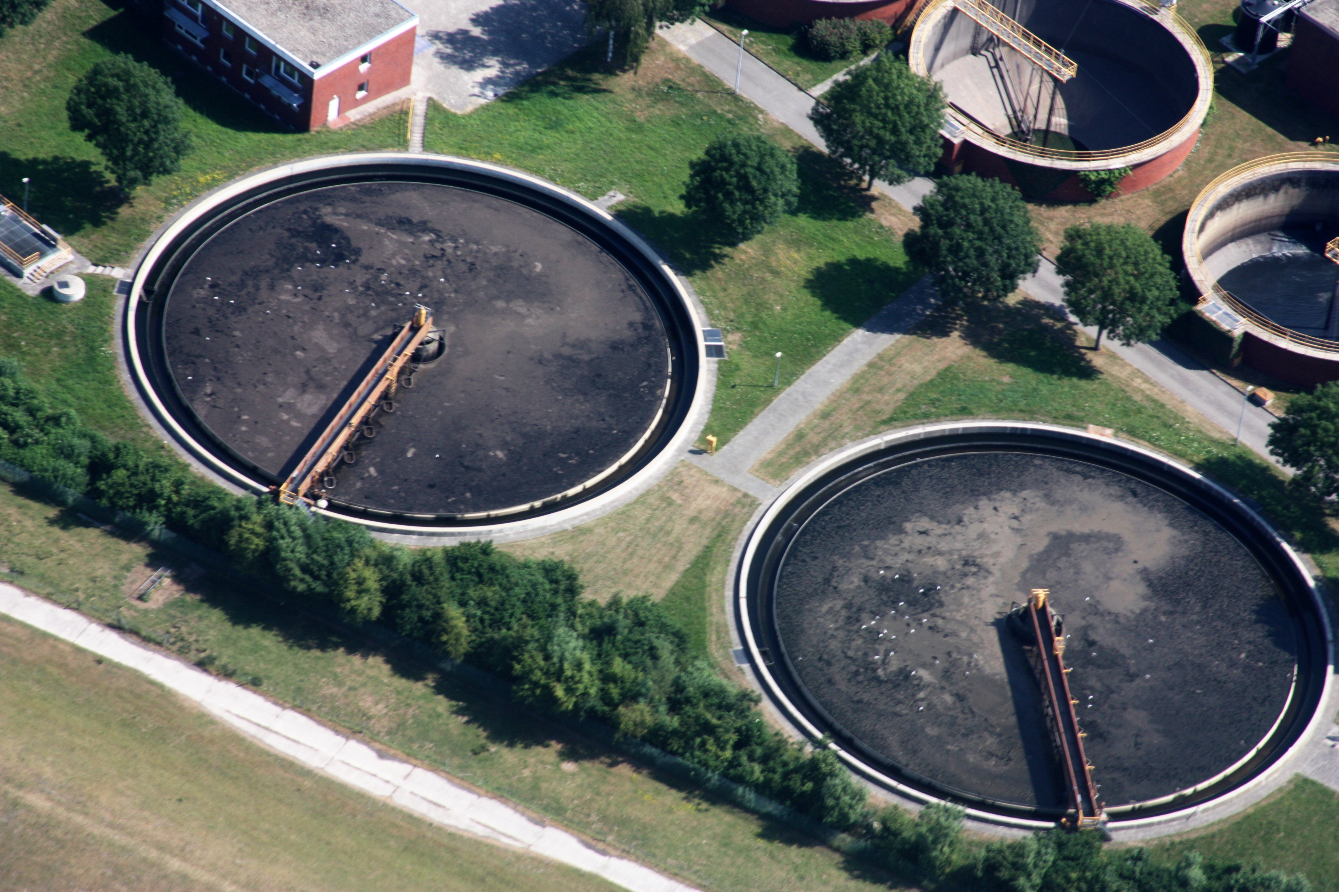 Luftaufnahme; Flug von Leer nach Emden; Flughöhe 1500 ft; Juli 2010; Originalfoto bearbeitet: Tonwertkorrektur und Bild geschärft mit Hochpassfilter